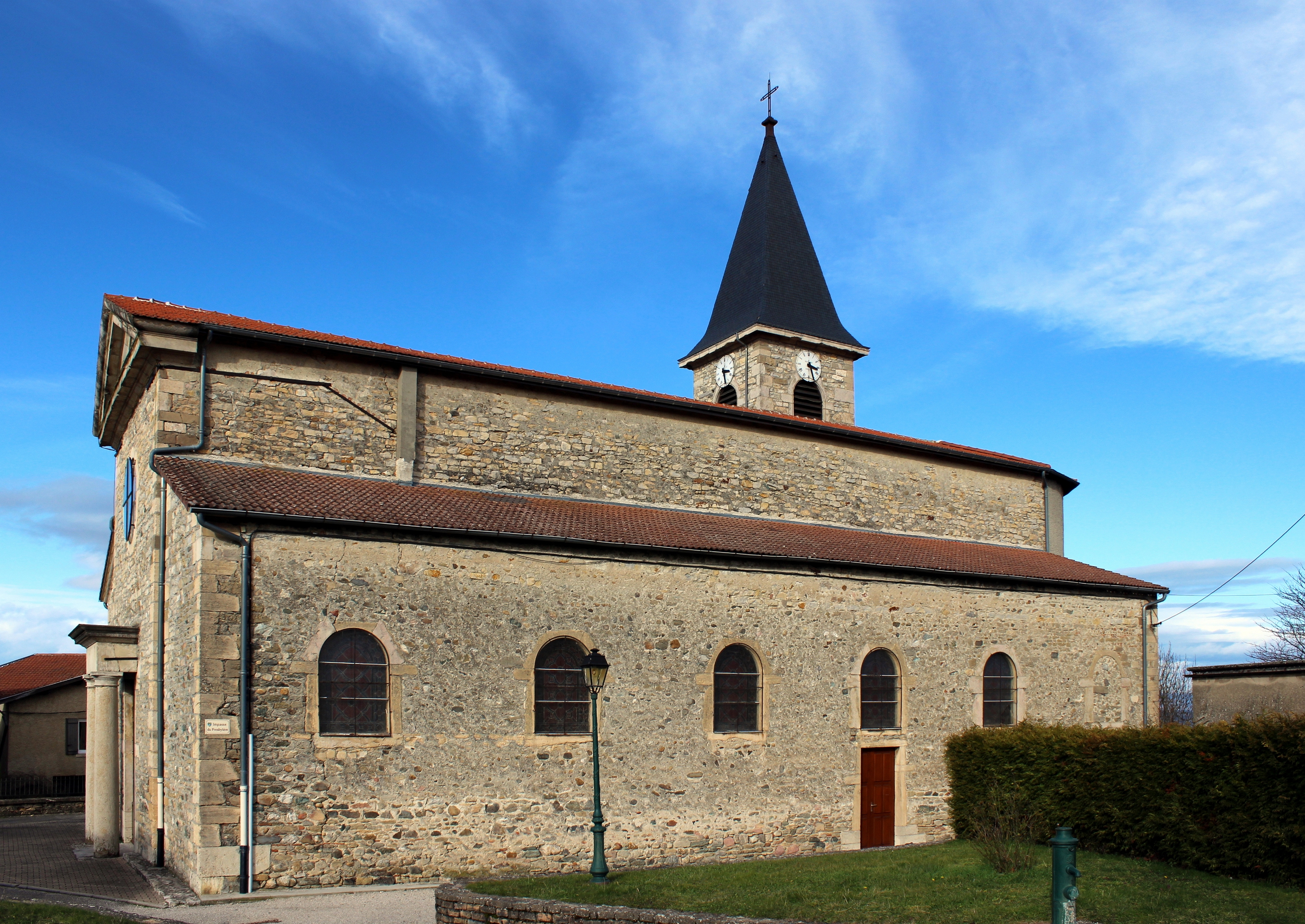 Eglise de Roche.